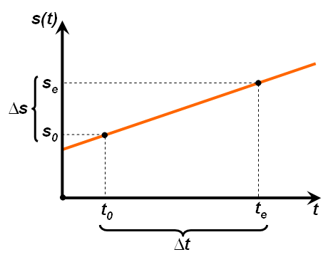 Grafiek van een ERB.